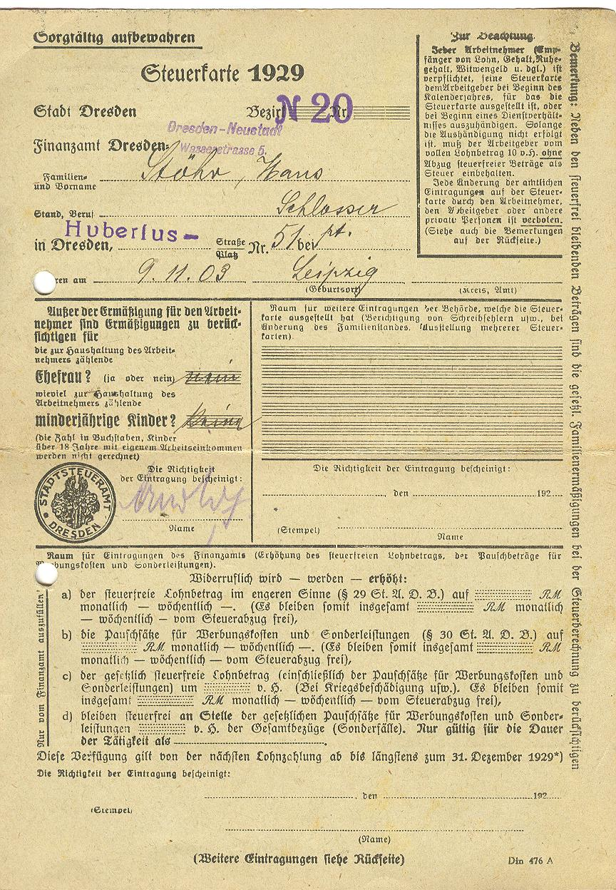 Steuerkarte 1929 Deutschland Format A5. Auf der Rückseite der Steuerkarte ist vermerkt: beschäftigt vom 1.1.29 bis 16.4.29 beim Dresdner Automobil- Droschken und Luxuswagen-Bestelldienst mbH mit einem Arbeitslohn von 704,50 RM und einer einbehaltenen Steuer von 27,25 RM